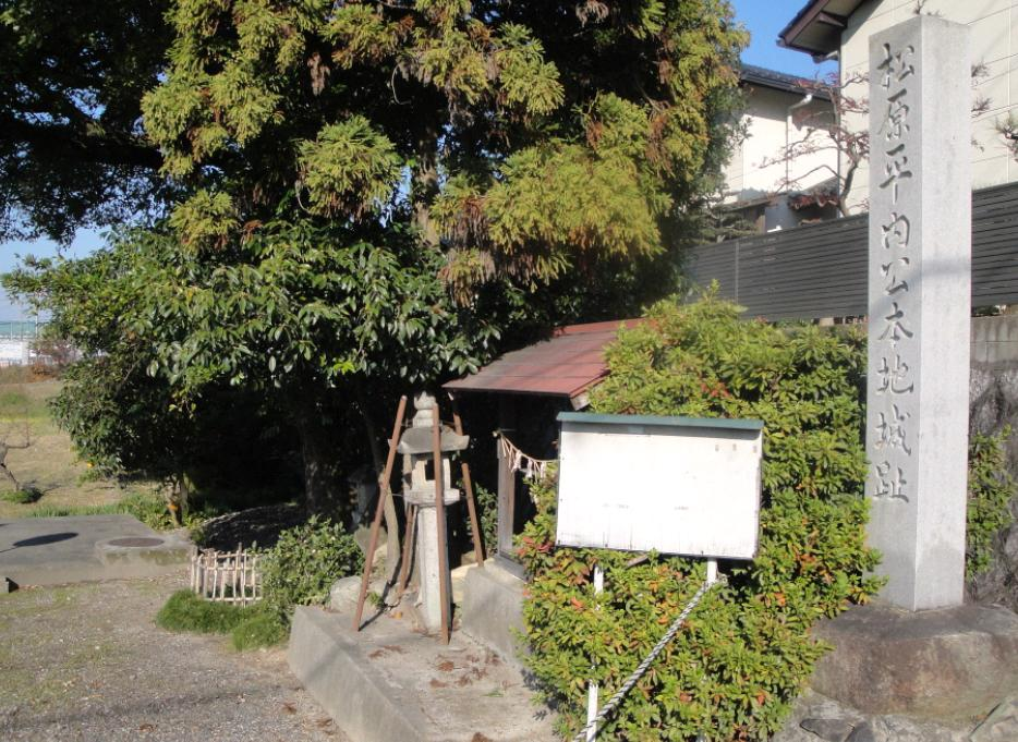 本地城趾